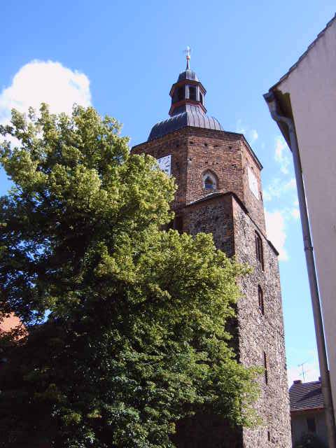 Wendisch-Deutsche Doppelkirche in Vetschau, Land Brandenburg, Deutschland Turm Bild aufgenommen am 26.6.2006 von Olaf Meister